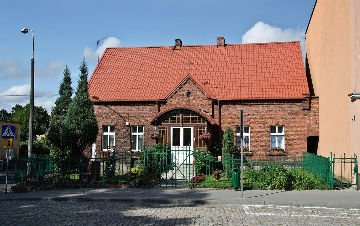 700-lecia 24